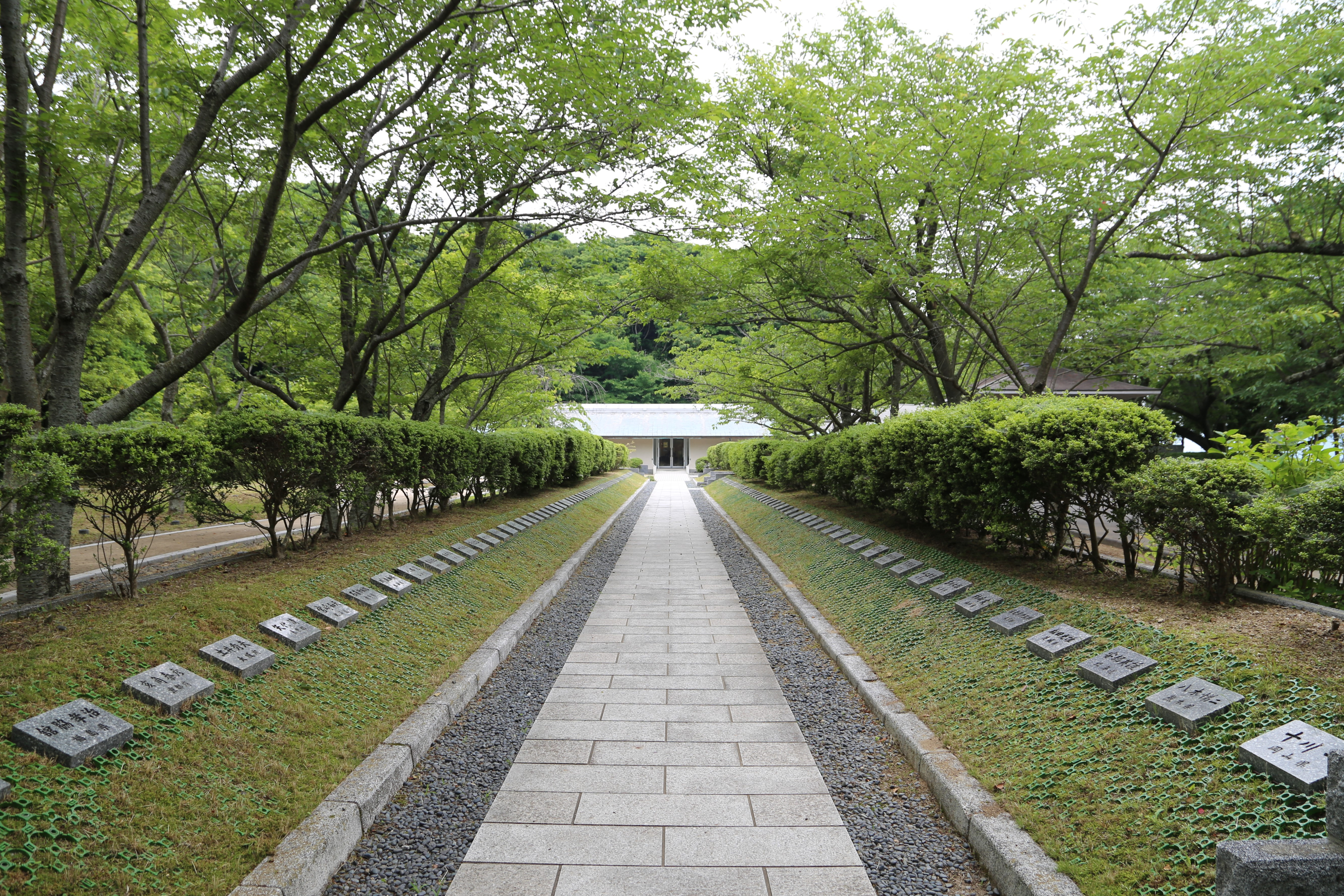 山口県周南市沖の大津島にある回天記念館